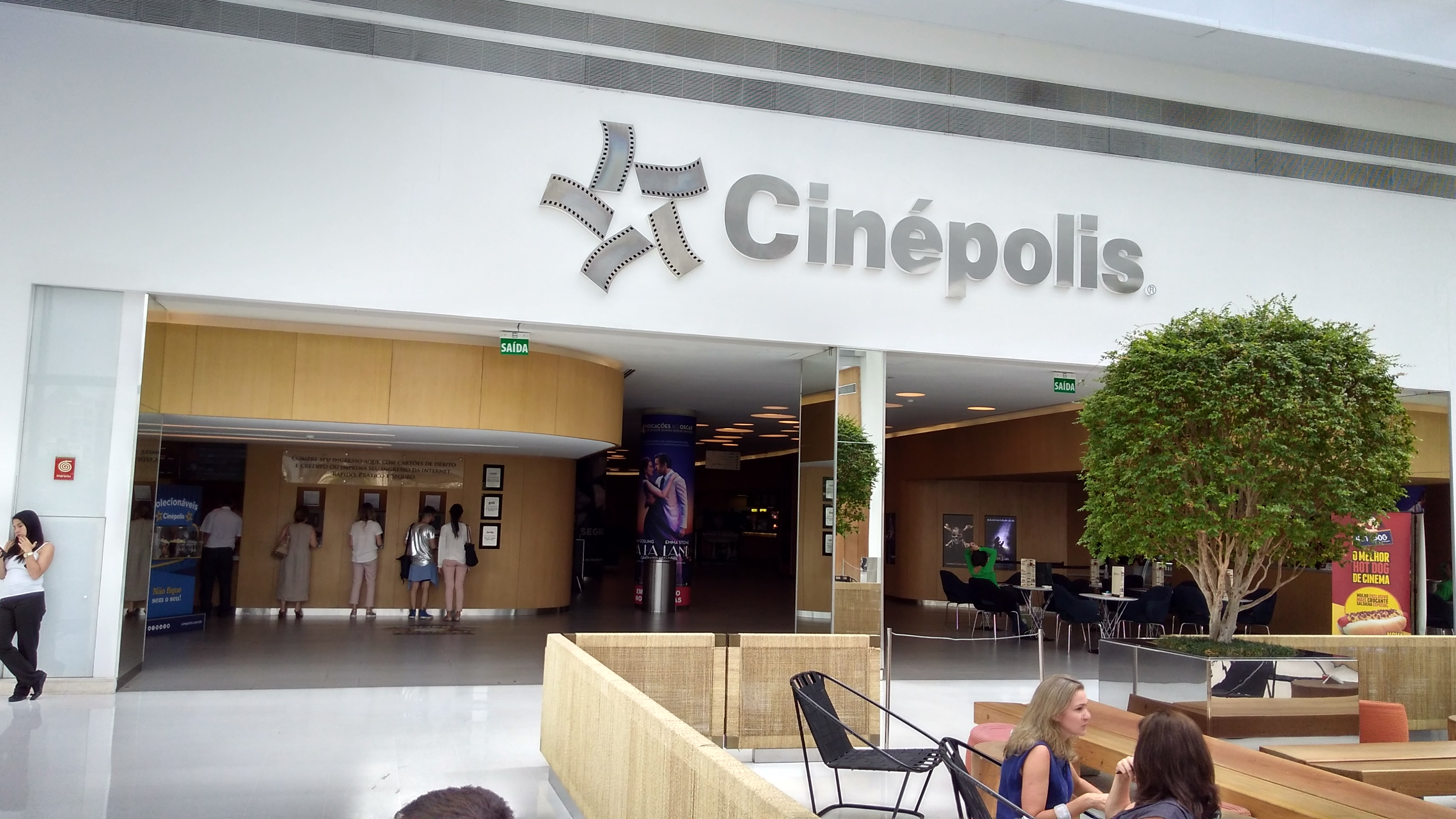 Fachada do Cinépolis JK Iguatemi de São Paulo, SP